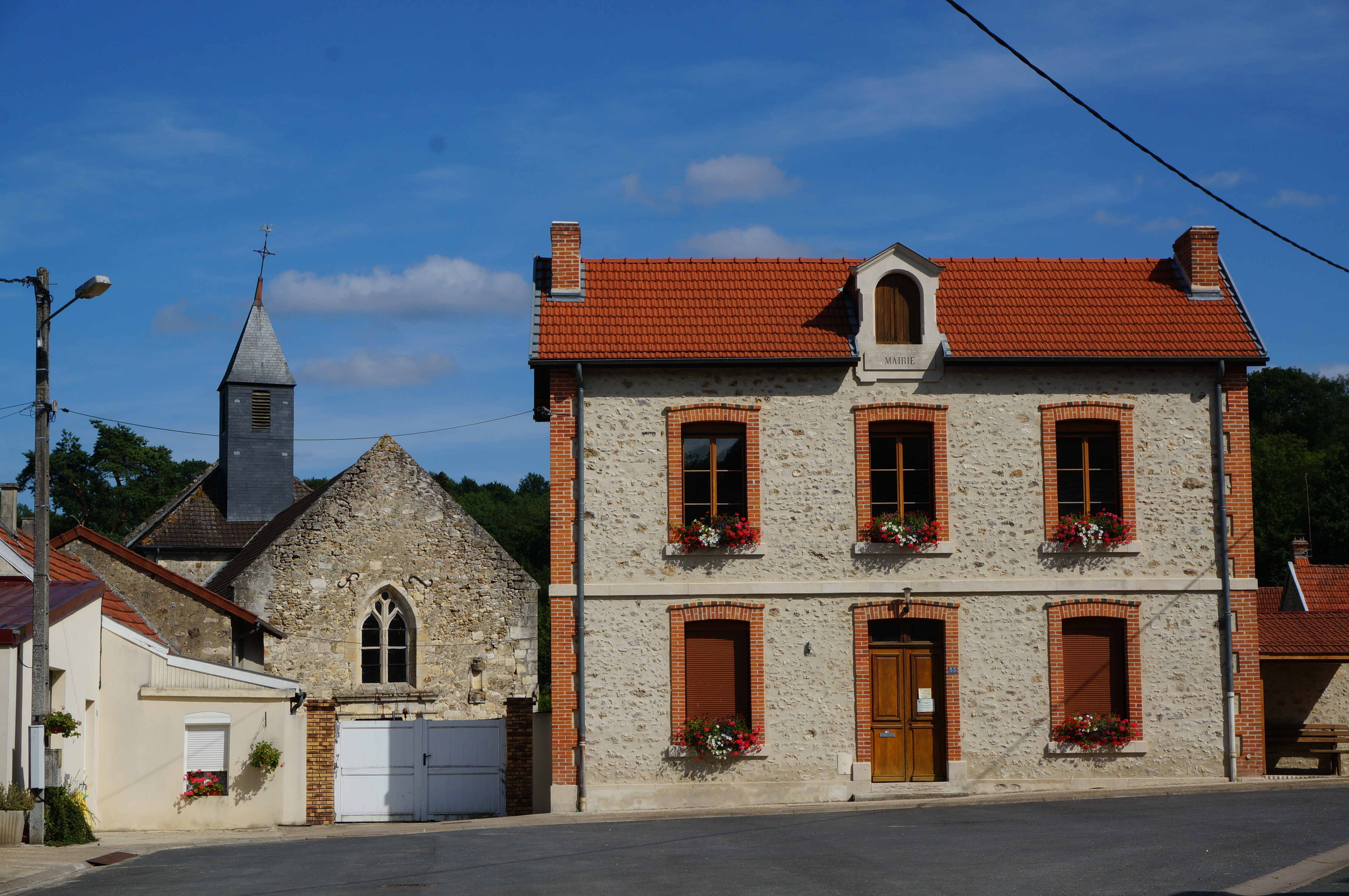 Vue de .